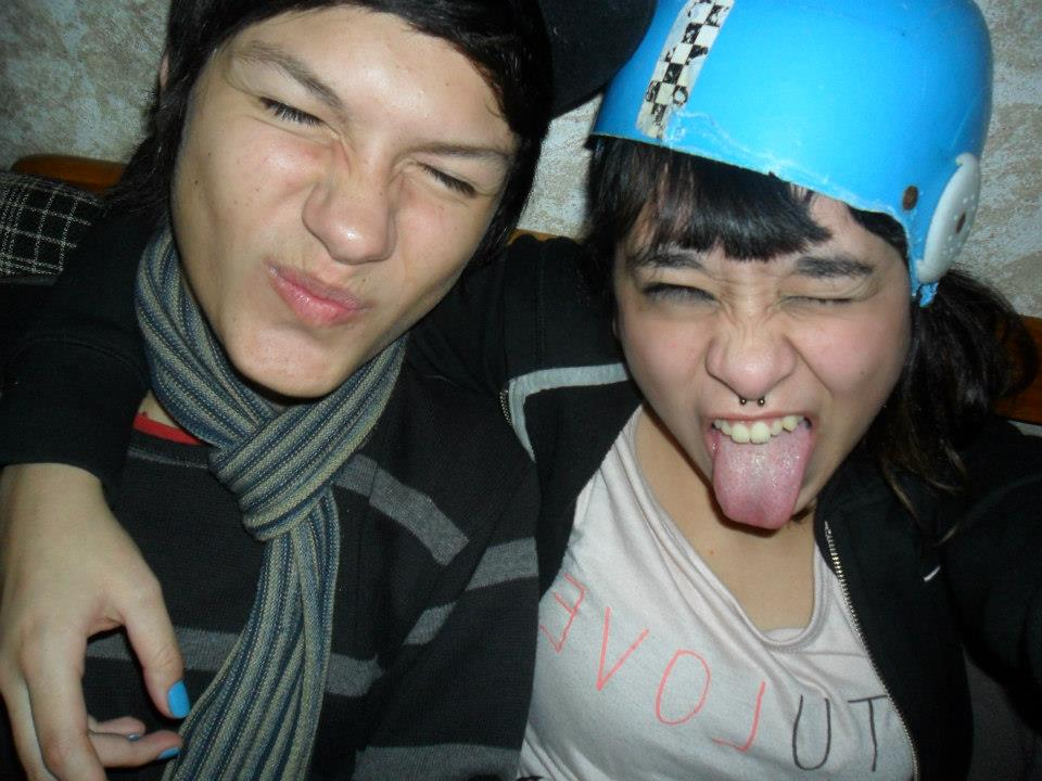 Descripción gráfica de una careta